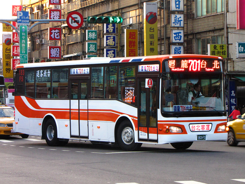 中文（台灣）: 臺北客運日野RK8JMSA大客車183-FS，行經臺北市和平西路三段。